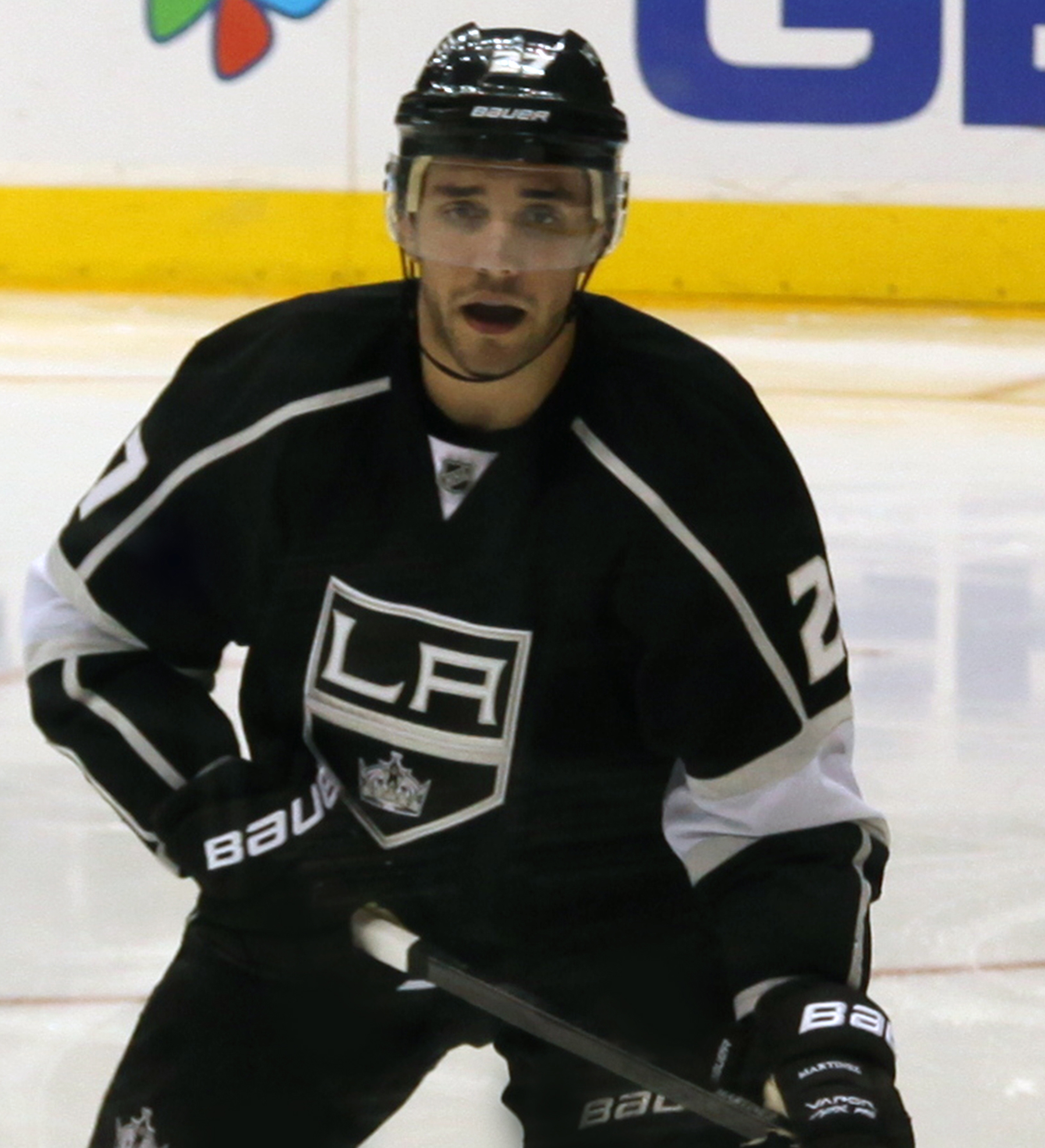 Martinez in 2013.